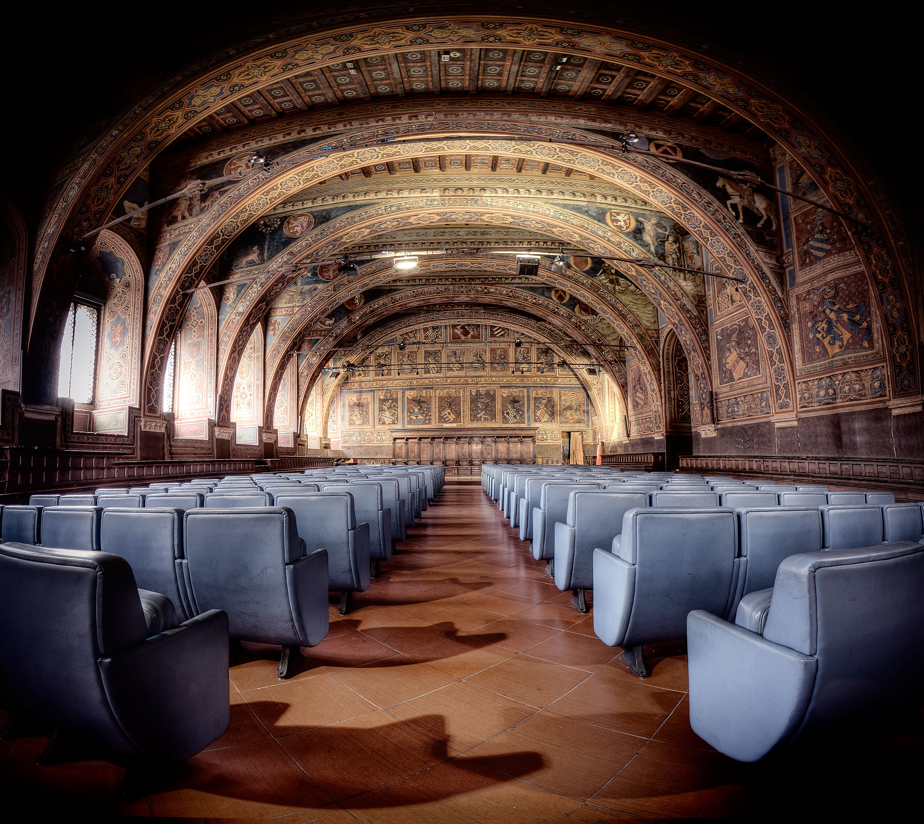 Sala dei Notari This is a photo of a monument which is part of cultural heritage of Italy.